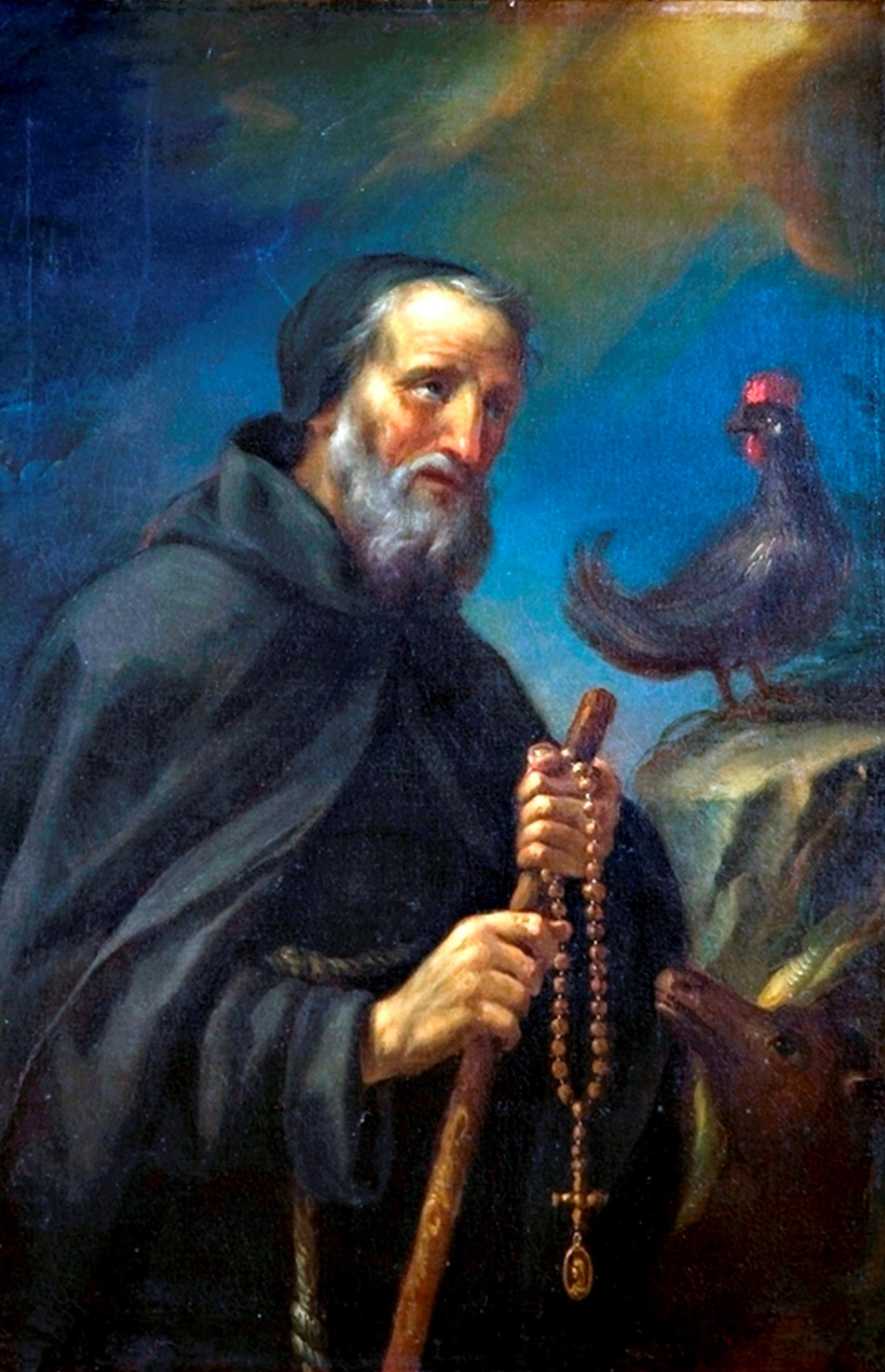 Dipinto tela, pittura a olio di Marchetti Giuseppe (1721-1801) conservato nella Raccolta Comunale d'Arte di Forlimpopoli (FC)